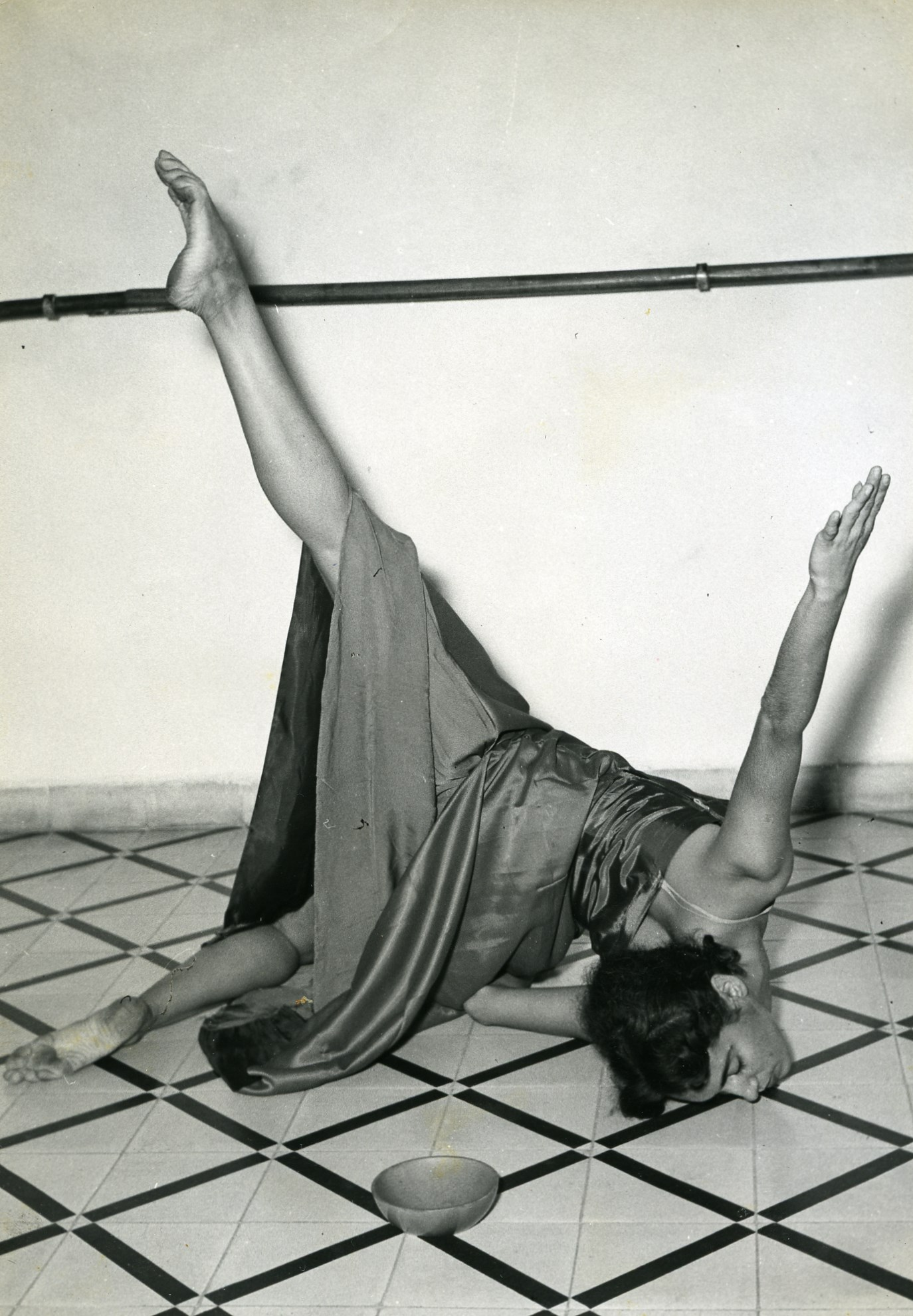 רינה שחם "המים המאררים" 1954